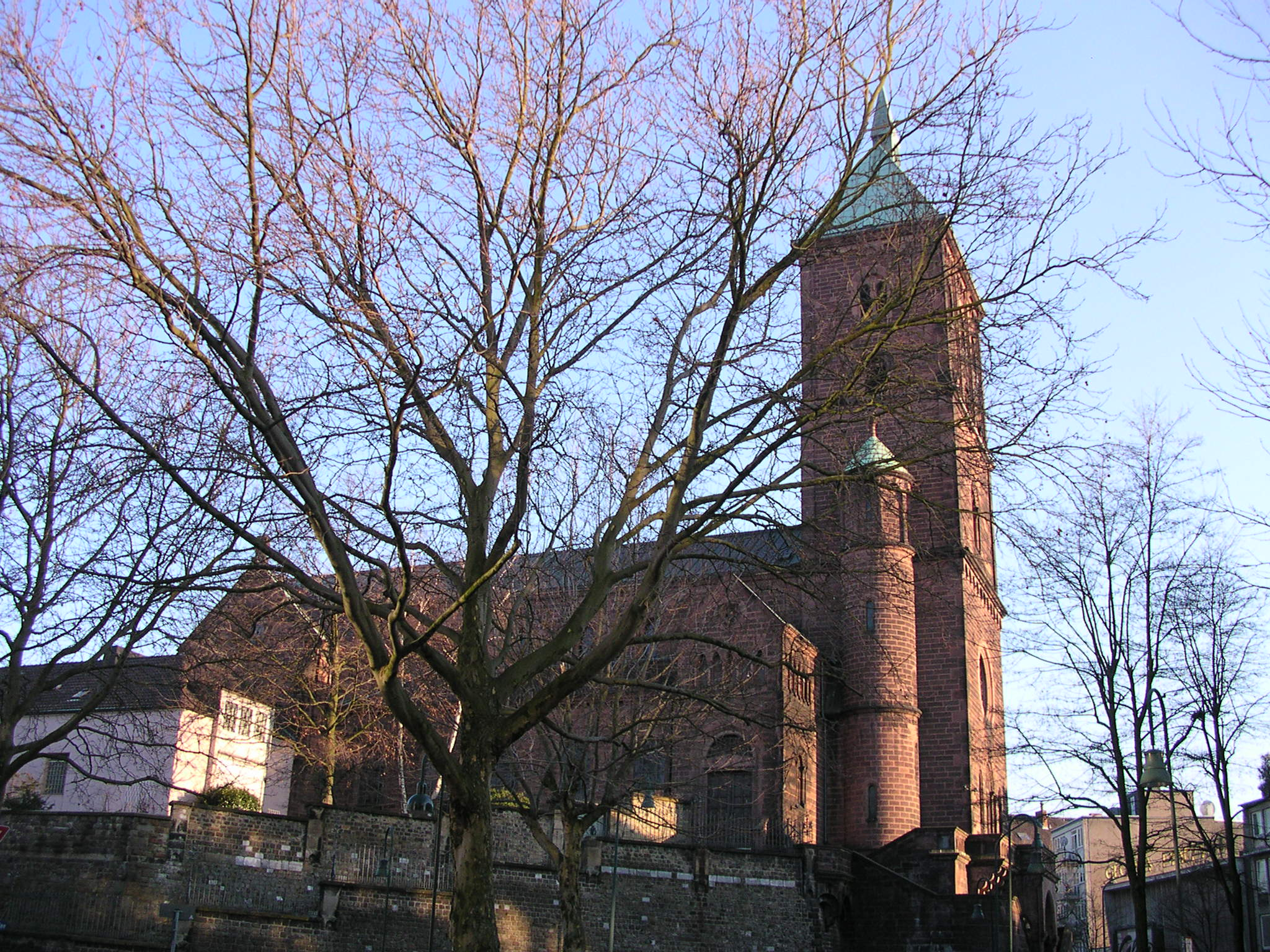 Aachen, Adalbertkirche von der Heinrichsallee aus gesehen